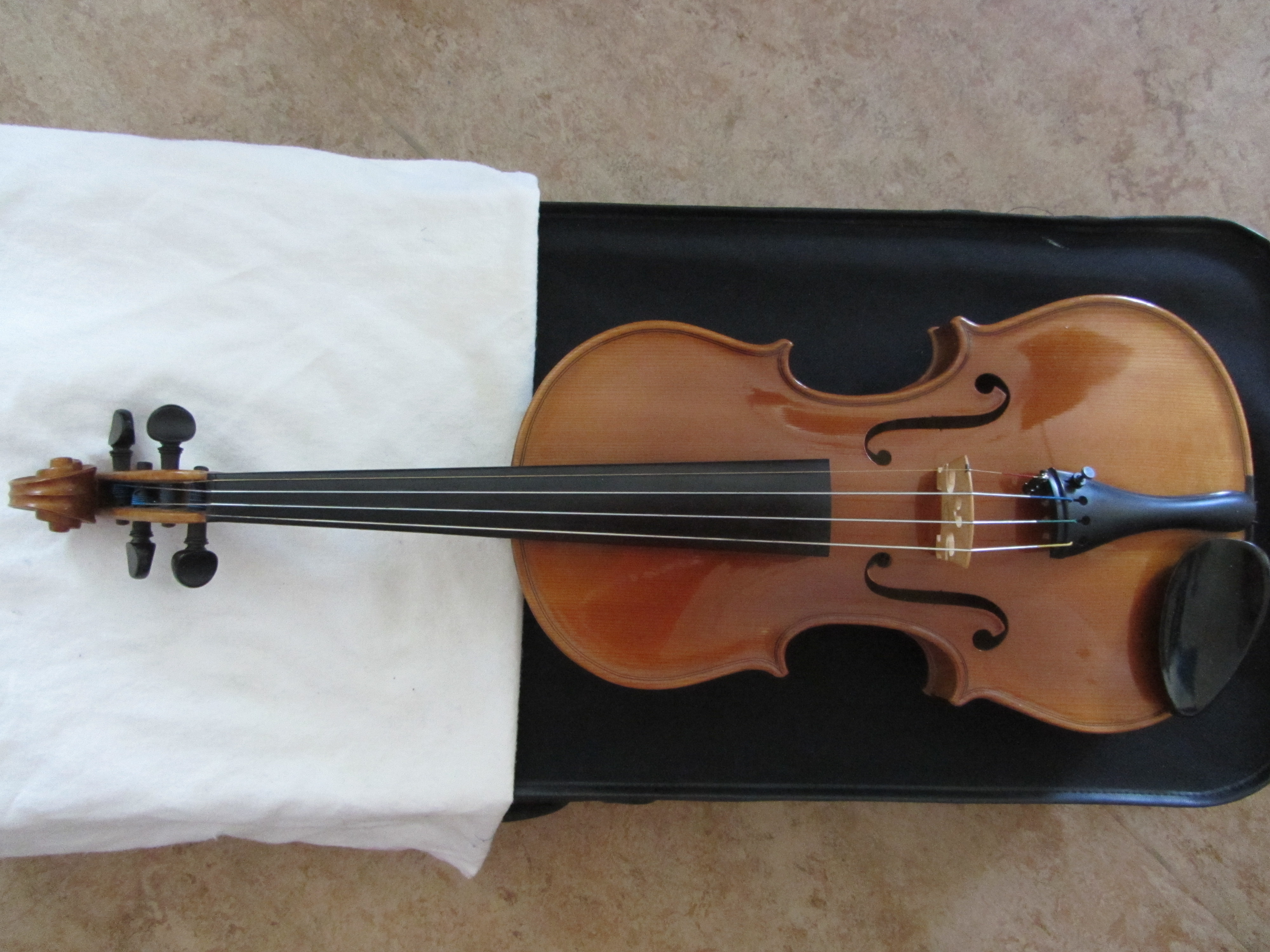 Fiol byggd av Anton Hammarström 1972 Timrå etikett inuti. Välbyggd med glänsande lack.